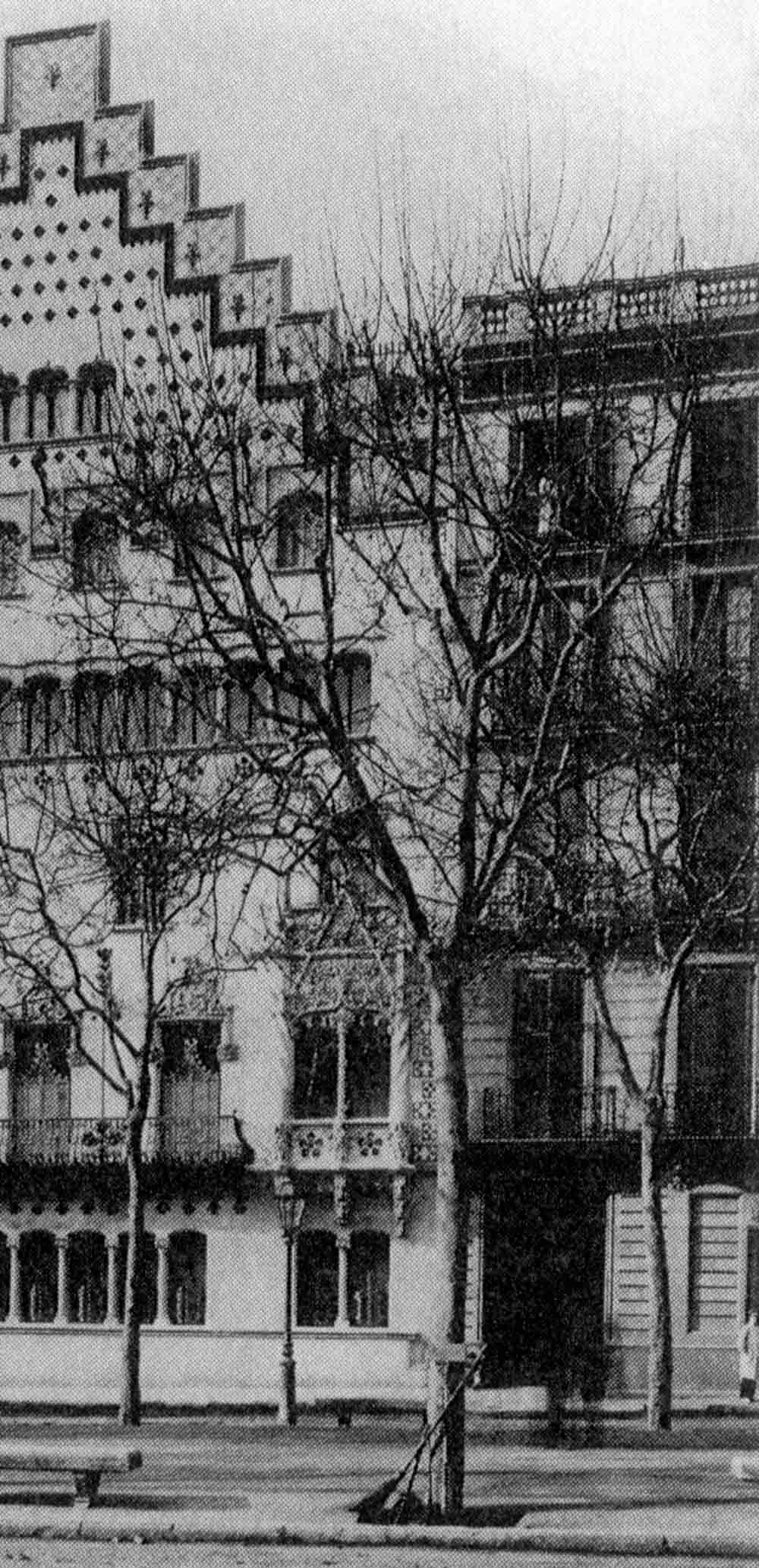 Vista parcial de la façana de la casa Batlló (dreta) abans de la reforma de Gaudi, junt amb la casa Amatller (esquerra)